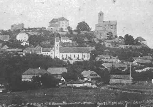 Ansicht von Brennberg in Bayern